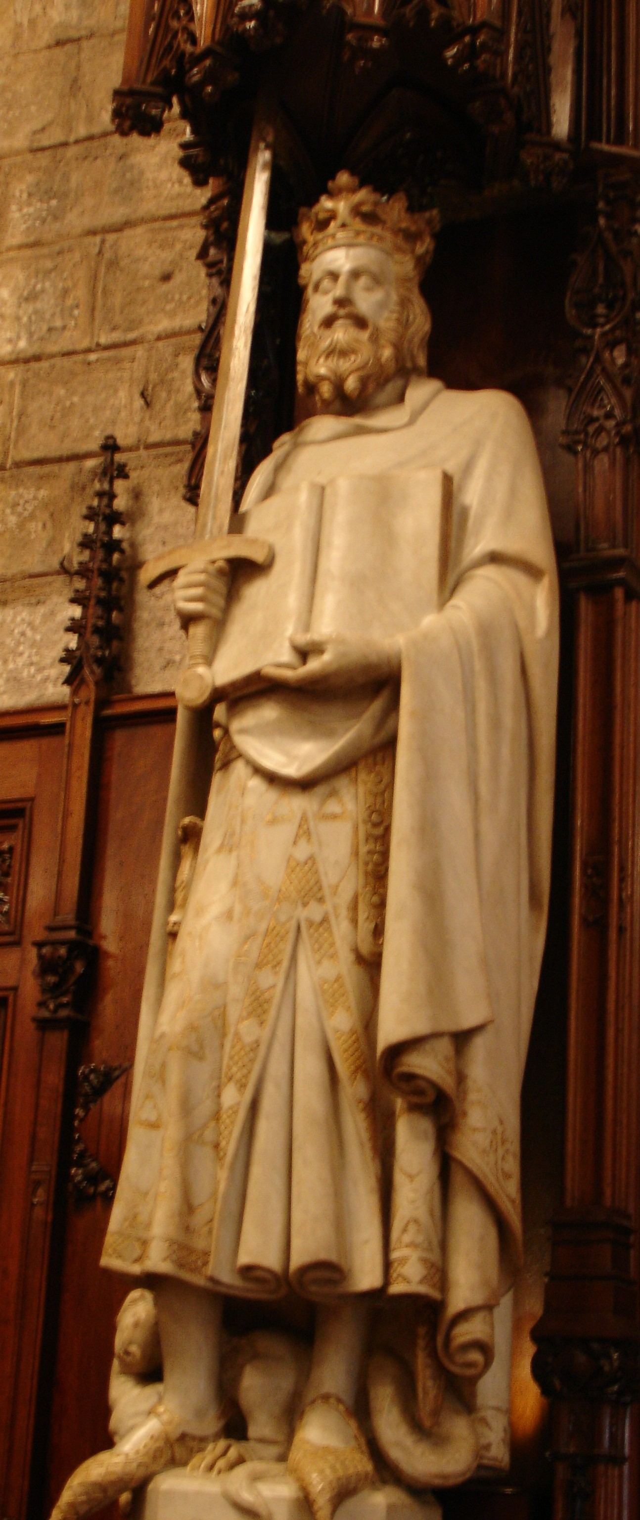 Jaume el Conqueridor, al Saló de Cent de l'Ajuntament de Barcelona.